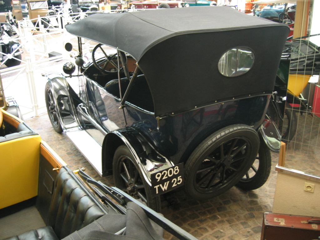 Peugeot Type 163 - Musée Peugeot Sochaux